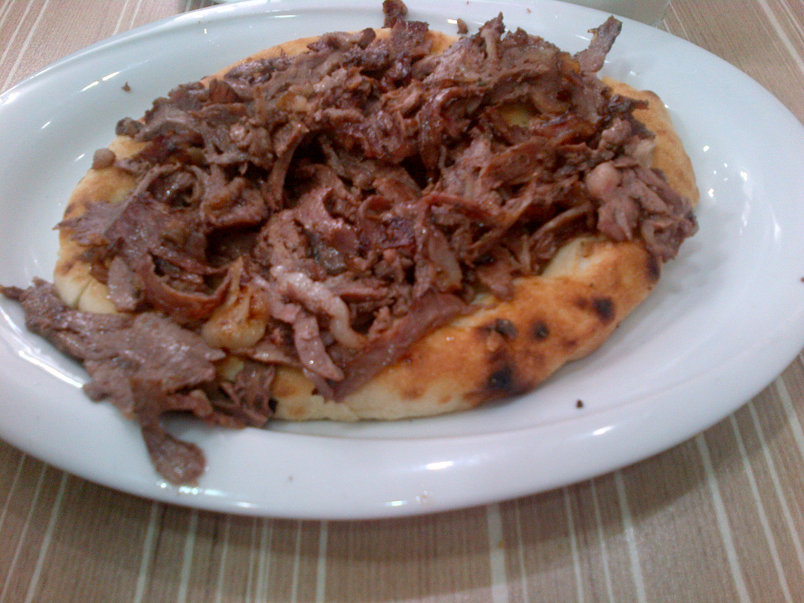 Döner turco clasico, de carne de ternero, servido encima del pide en el plato; la ensalada viene en plato aparte.